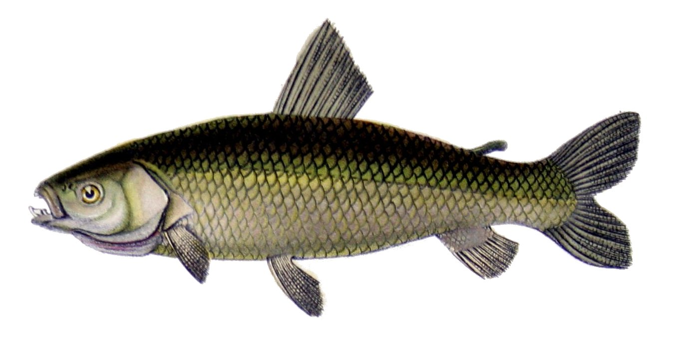 Leporinus pachyrus Cuv. Val. = Leporinus pachyurus Valenciennes, 1850